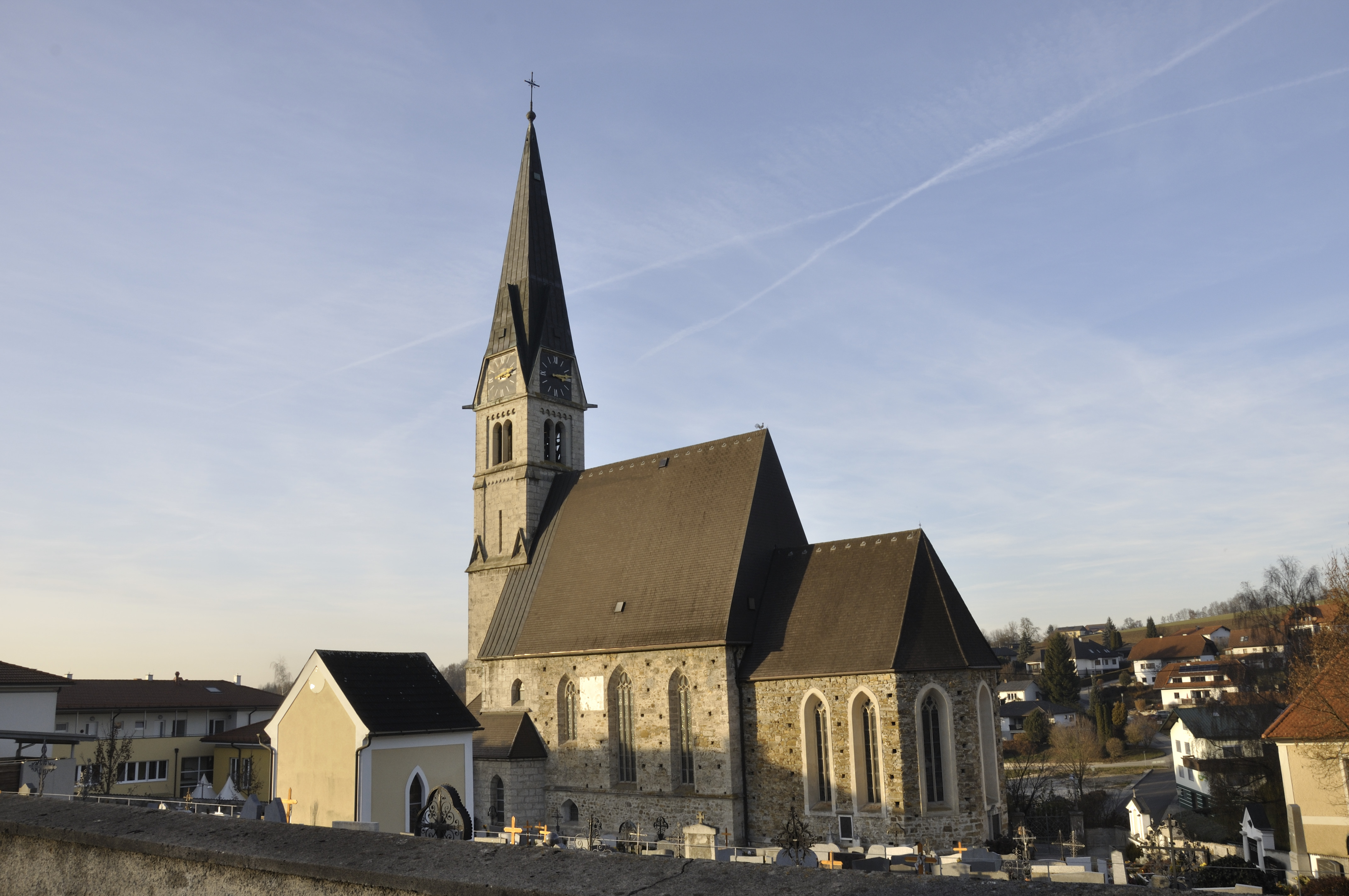 Die Pfarrkirche von Nußbach von Südost gesehen